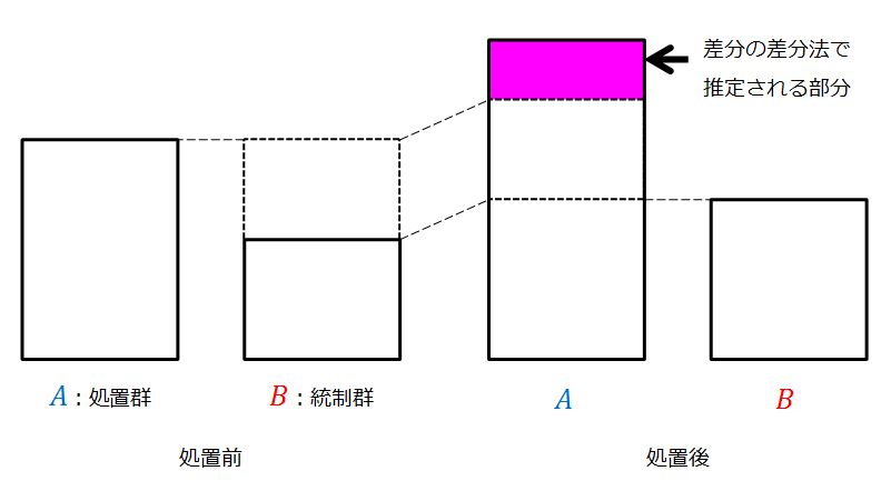 差分の差分法の説明